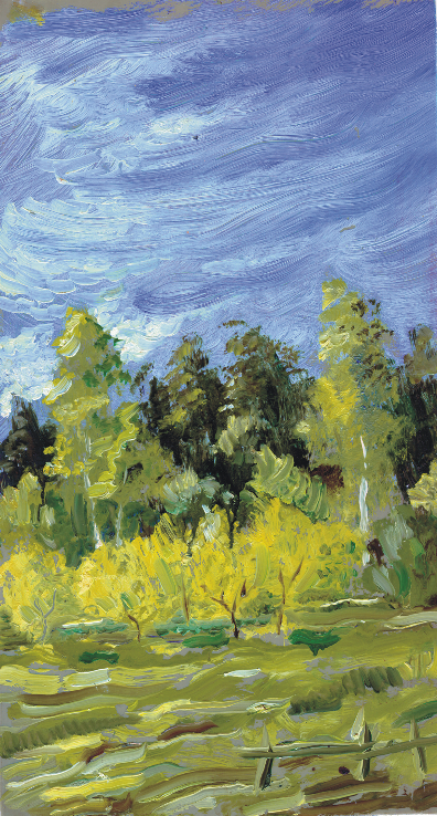 "Осень". Масло не пластике. 34,9 Х 18,7 см